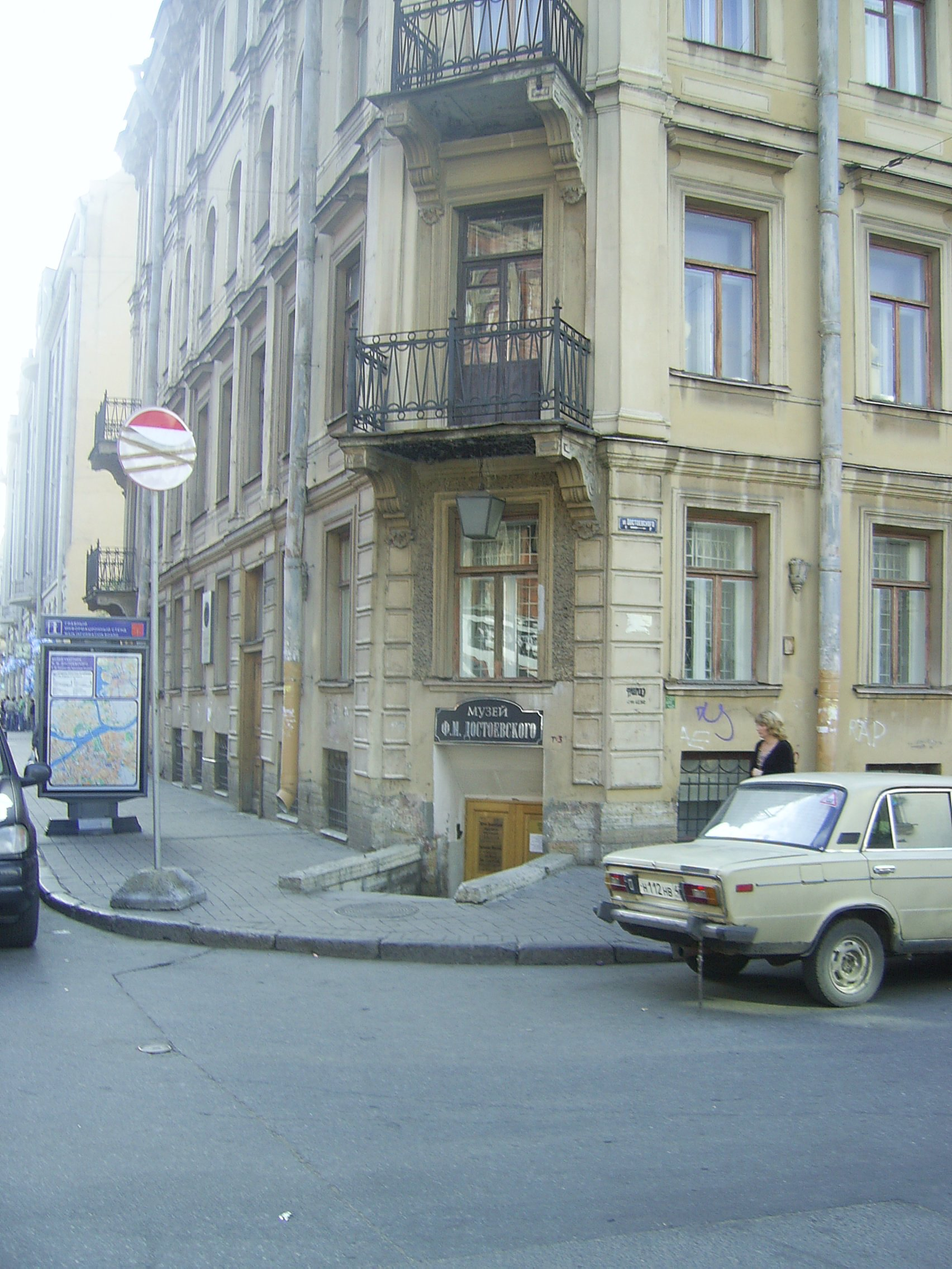 Dostoevsky_museum_Saint-Petersburg